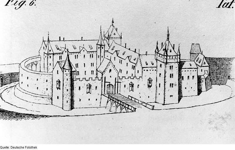 Original image description from the Deutsche Fotothek Freiberg. Schloß Freudenstein, Rekonstruktionszeichnung des Zustandes 1554